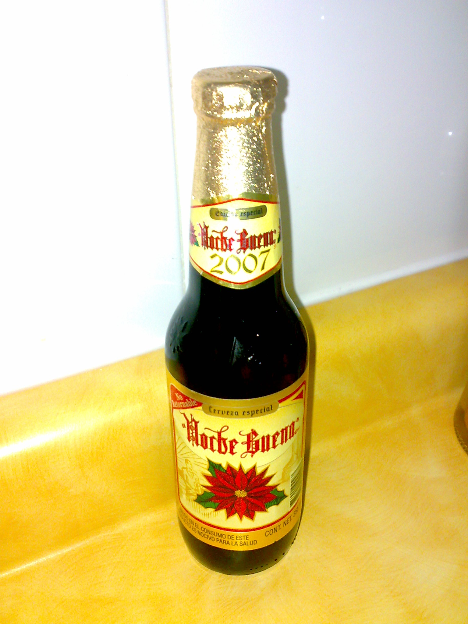 La cerveza Noche Buena, edition 2007.